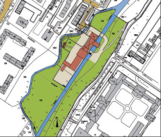 Lageplan der Kraemerschen Kunstmühle in München